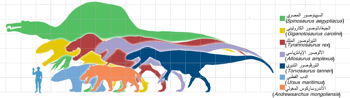 مُقارنة بين أحجام عدّة أنواع من الضواري الأرضية من فترات زمنية مختلفة. كل مُربع يُمثل مترًا مربعًا واحدًا.